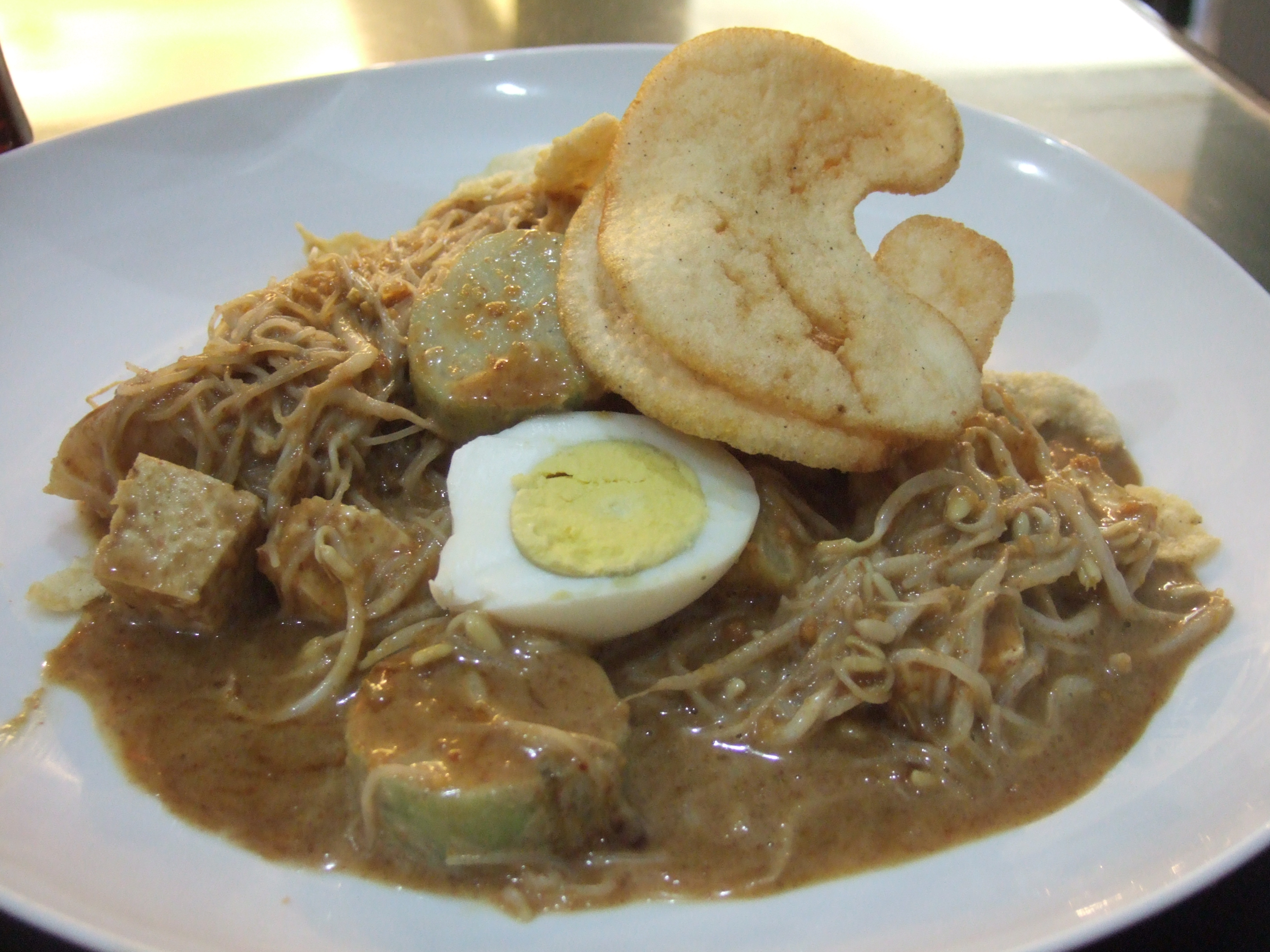 Ketoprak di Jakarta